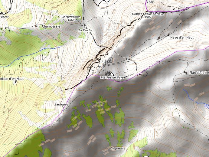 carte réalisée sur umap This map may be incomplete, and may contain errors. Don't rely solely on it for navigation.